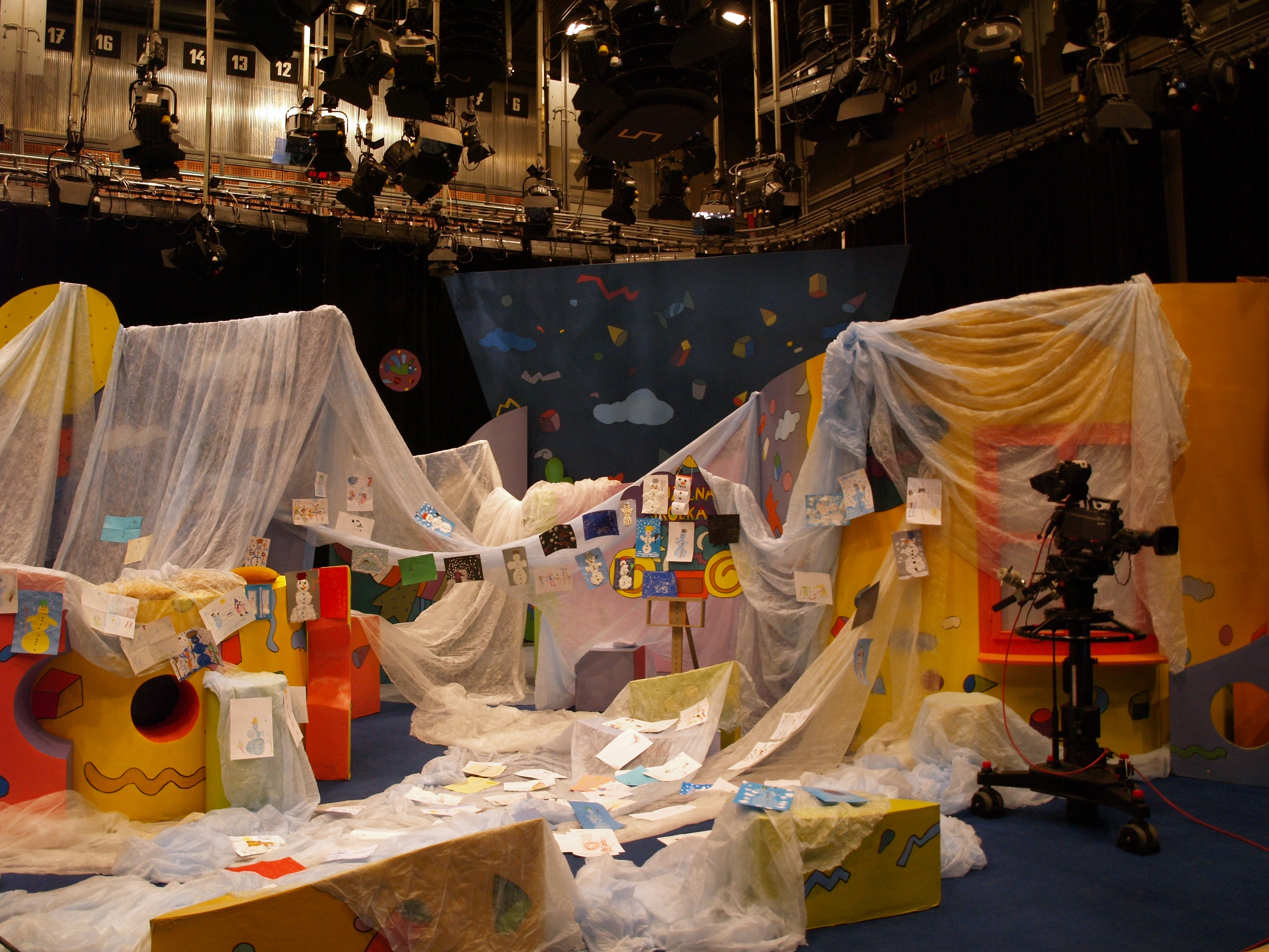 Studio České televize KH-3, kde probíhá natáčení Kouzelné školky, pořadu pro děti